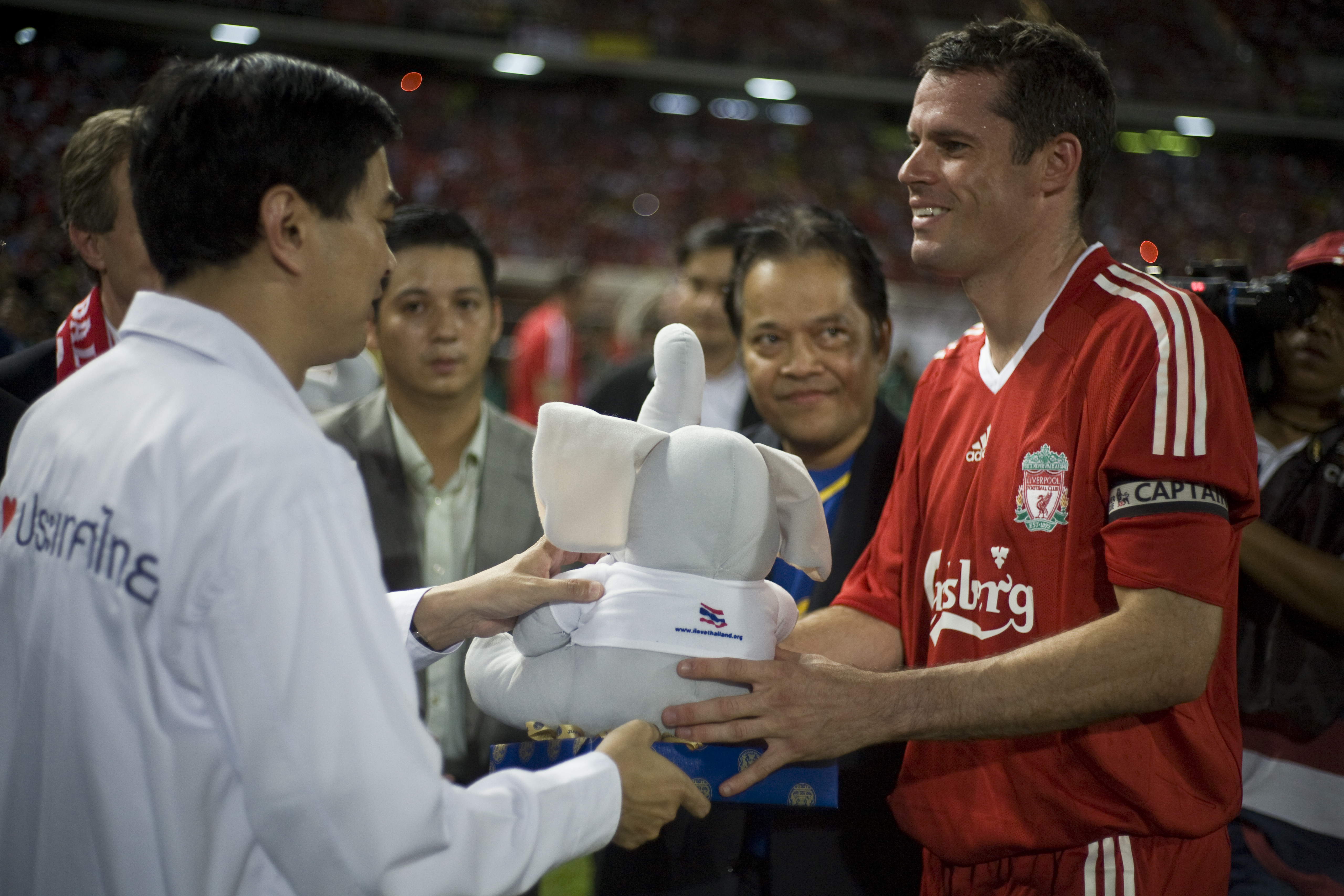 นายกรัฐมนตรี เป็นประธานทีมเชียร์ไทย ในการแข่งขันฟุตบอลทีมชาติไทย-ทีมลิเวอร์พูล ณ สนามราชมังคลากีฬาสถาน 22 กรกฏาคม 2552 (The Official Site of The Prime Minister of Thailand Photo by พีรพัฒน์ วิมลรังครัตน์)